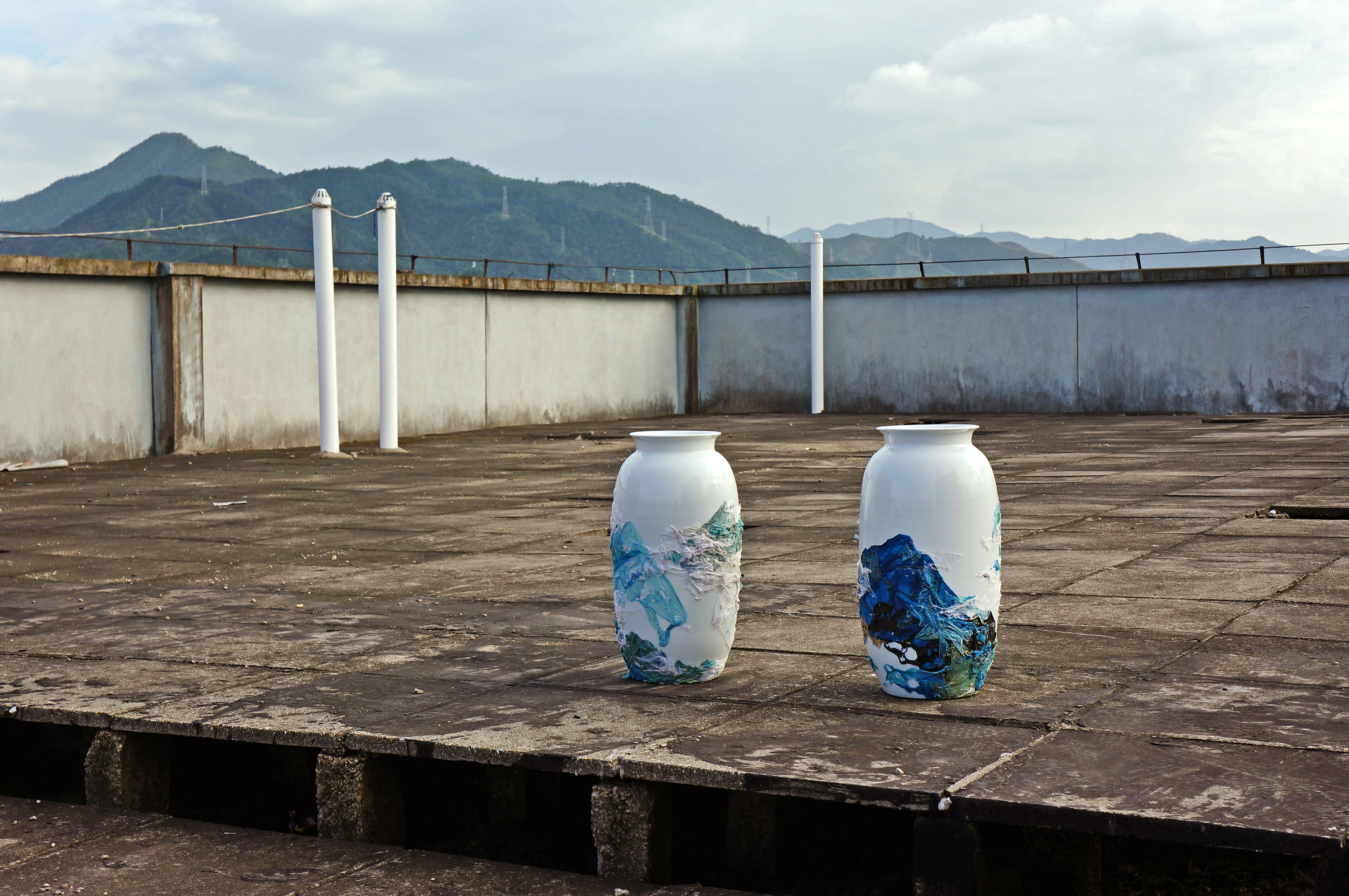 Karina Marusińska, "Kraj-obraz", 2013, porcelana, worki foliowe, [4x] 63 x 32 x 32 cm; realizacja w ramach projektu „Kaolin – Art and Design in Contemporary Ceramics” – Jingdezhen (Chiny); fot. Karina Marusińska